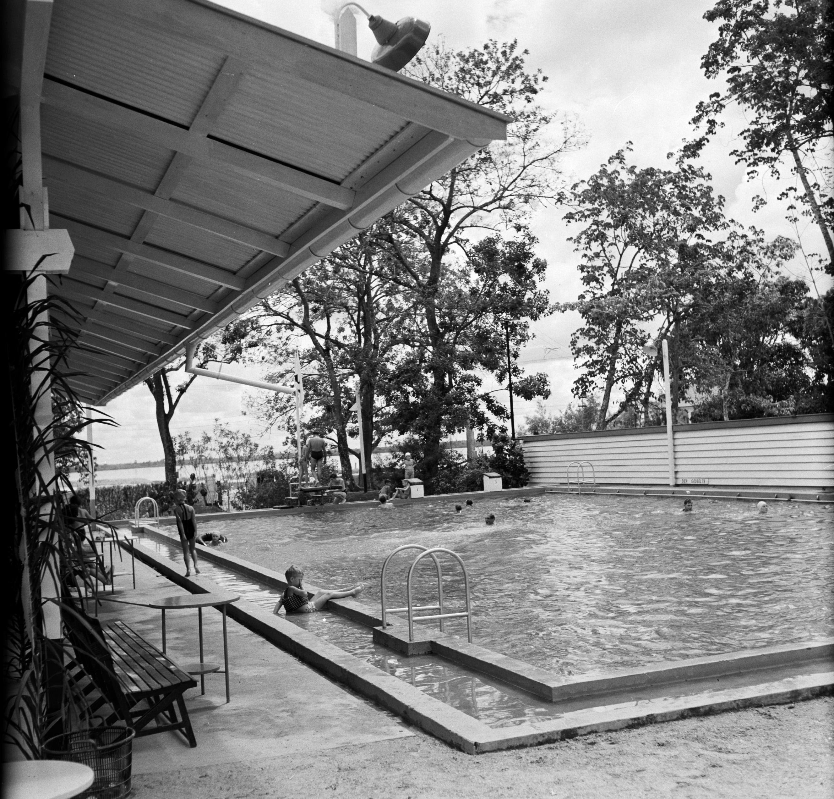 Collectie / Archief : Fotocollectie Van de Poll Reportage / Serie : Nederlandse Antillen en Suriname ten tijde van het koninklijk bezoek van koningin Juliana en prins Bernhard in 1955 Beschrijving : Zwembad in Suriname Datum : 1 oktober 1955 Locatie : Suriname Trefwoorden : zwembaden Fotograaf : Poll, Willem van de Auteursrechthebbende : Nationaal Archief Materiaalsoort : Negatief (zwart/wit) Nummer archiefinventaris : bekijk toegang 2.24.14.02 Bestanddeelnummer : 252-5232